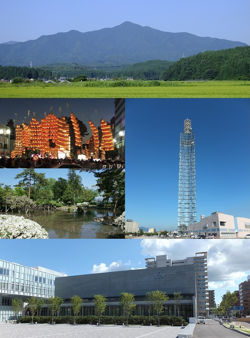 秋田県秋田市のモンタージュ画像。